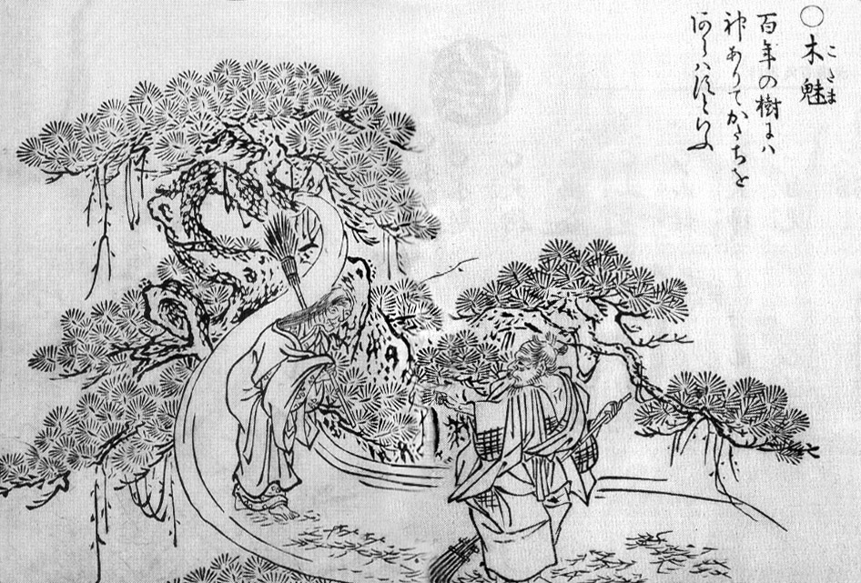 Kodama (木魅) from the Gazu Hyakki Yakō